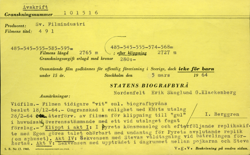 Censurkortet till Vilgot Sjömans 491